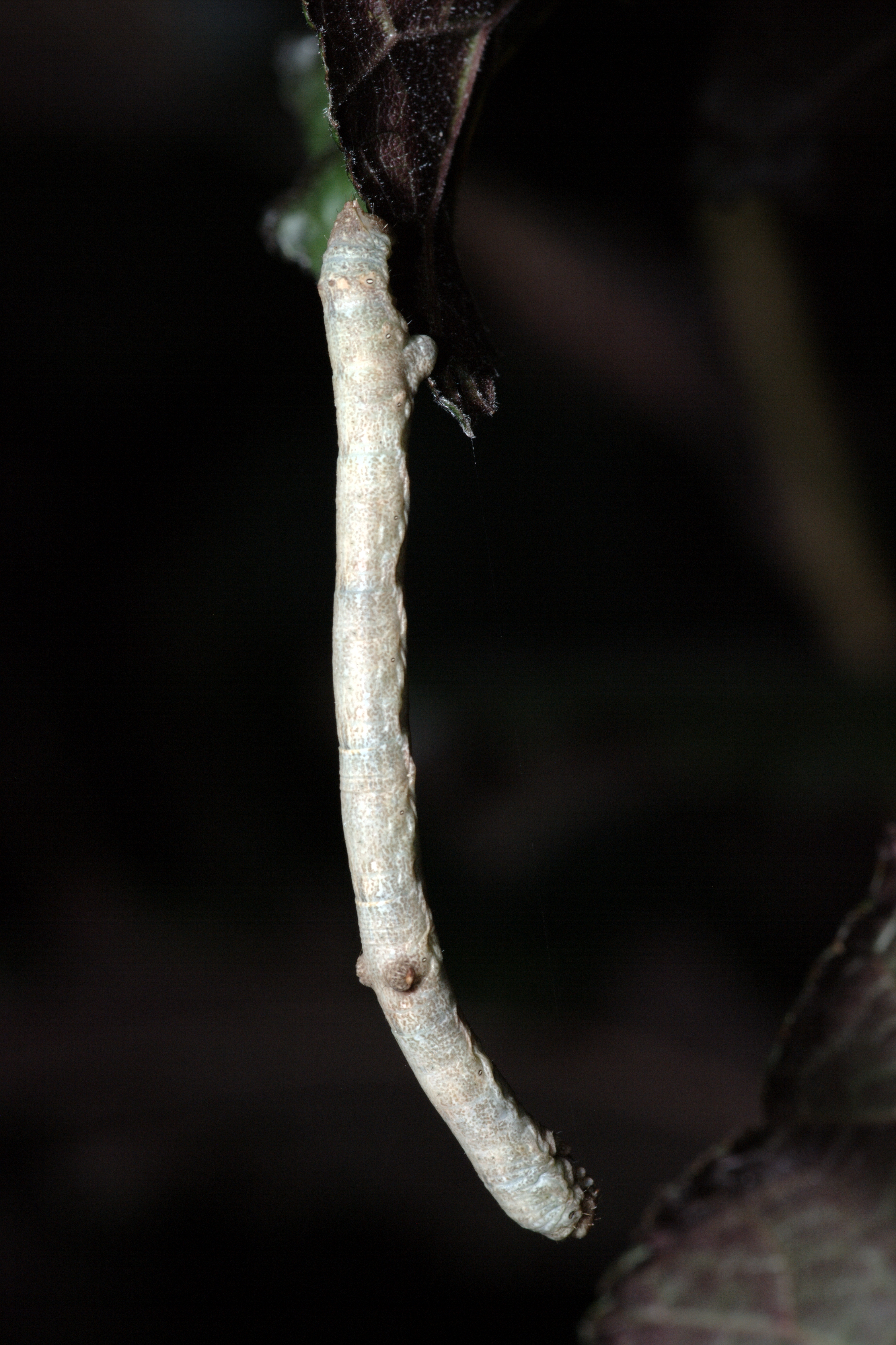 Sortie nocturne pour s'alimenter de la chenille Hypomecis punctinalis (la Boarmie parente) accrochée à une feuille de noisetier par les pattes arrières. Normandie.